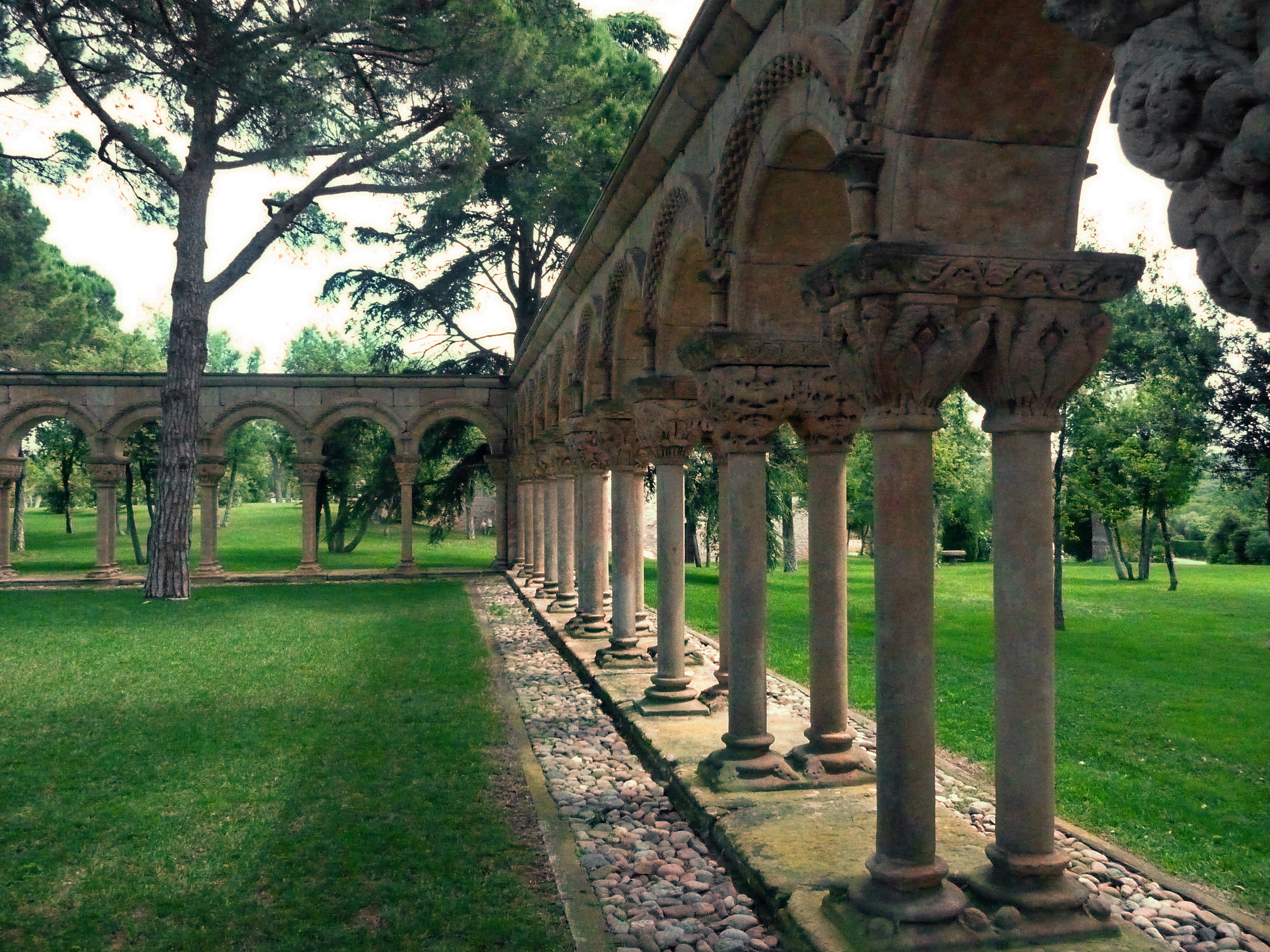 Claustre romànic del Mas del Vent de Palamós